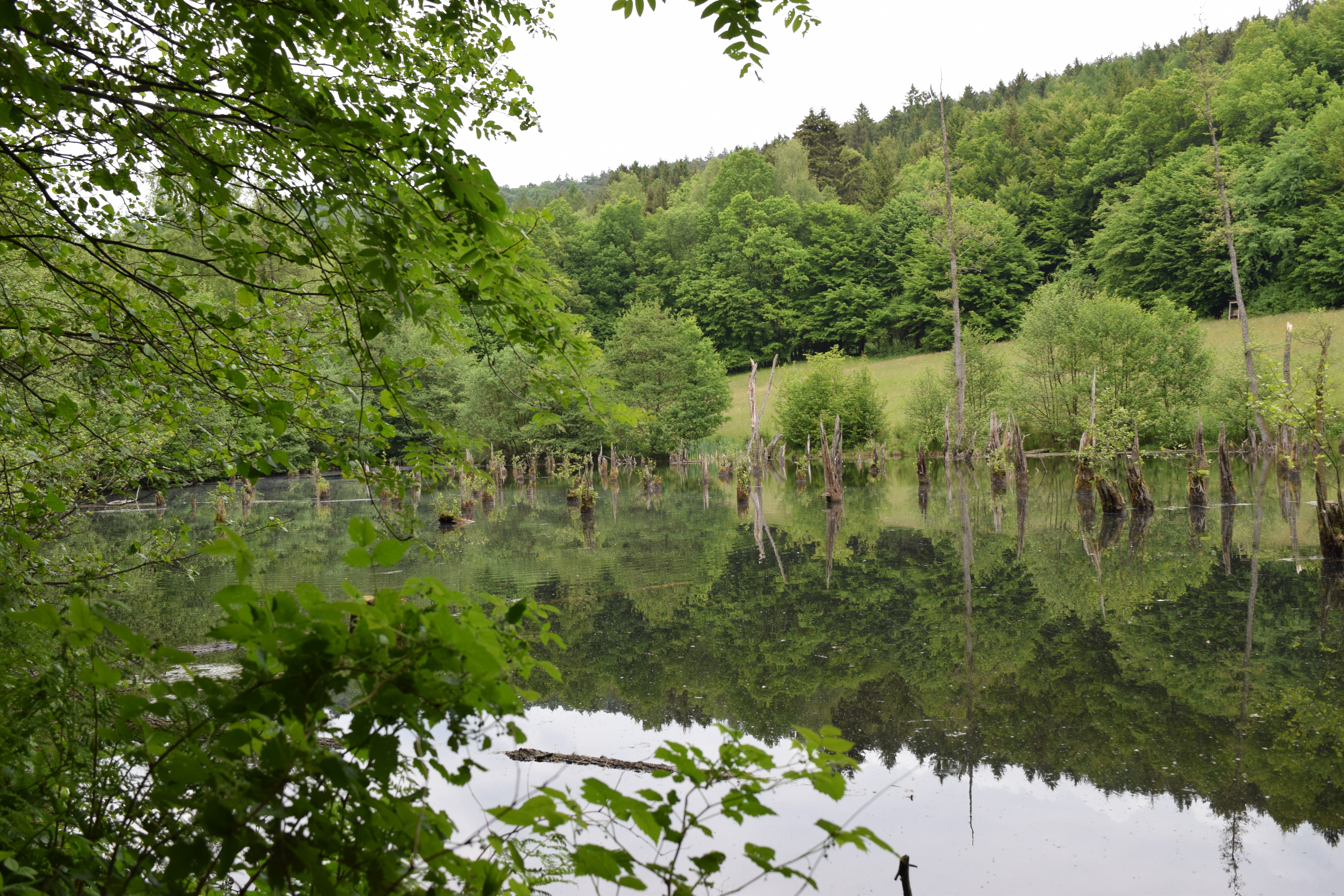 Naturschutzgebiet „Lochborn von Bieber“ im hessischen Main-Kinzig-Kreis; Totholz in ehemaligem Entwässerungssystem der dortigen Bergbautätigkeiten. Lagebeschreibung: Am westlichen Rand des ausgewiesenen Naturschutzgebietes.